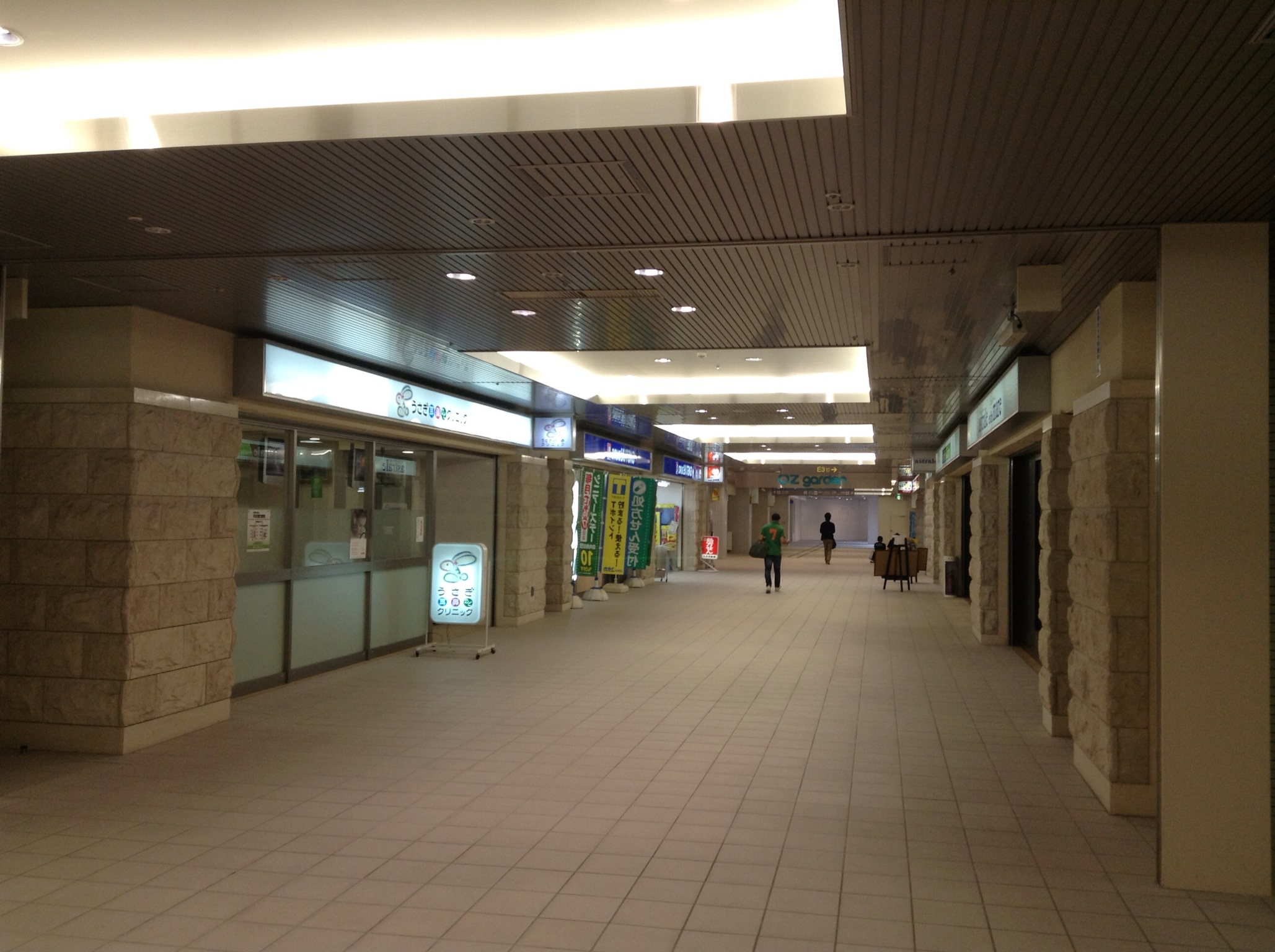 名古屋市北区大曽根にある大曽根地下街オズガーデンを南側より写す